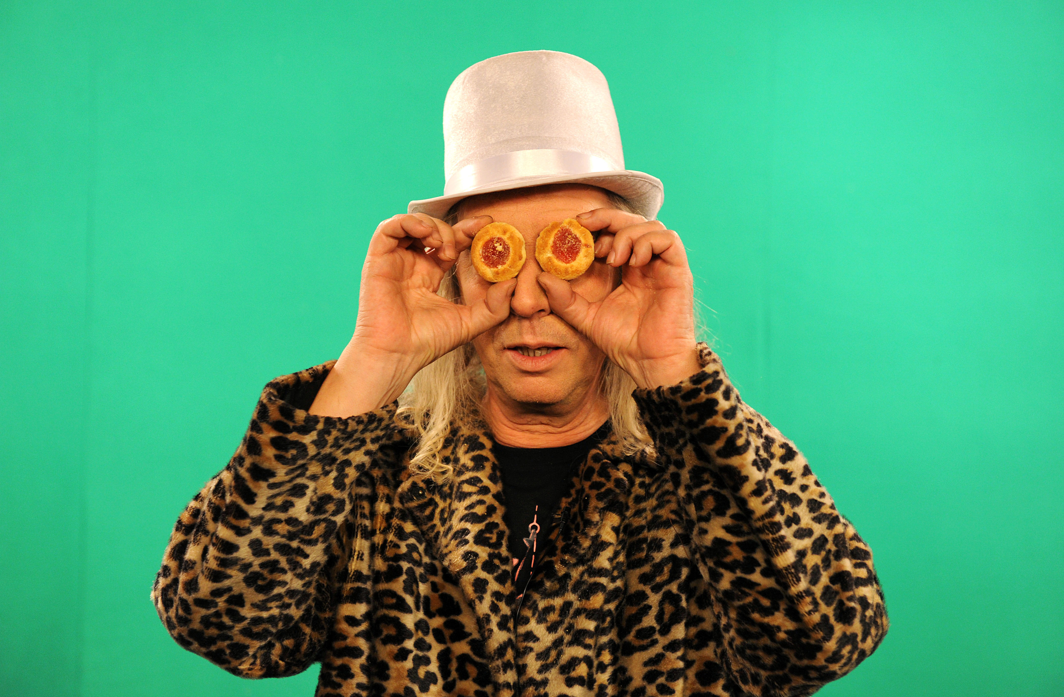 Novena temporada. Foto TVP 2014.